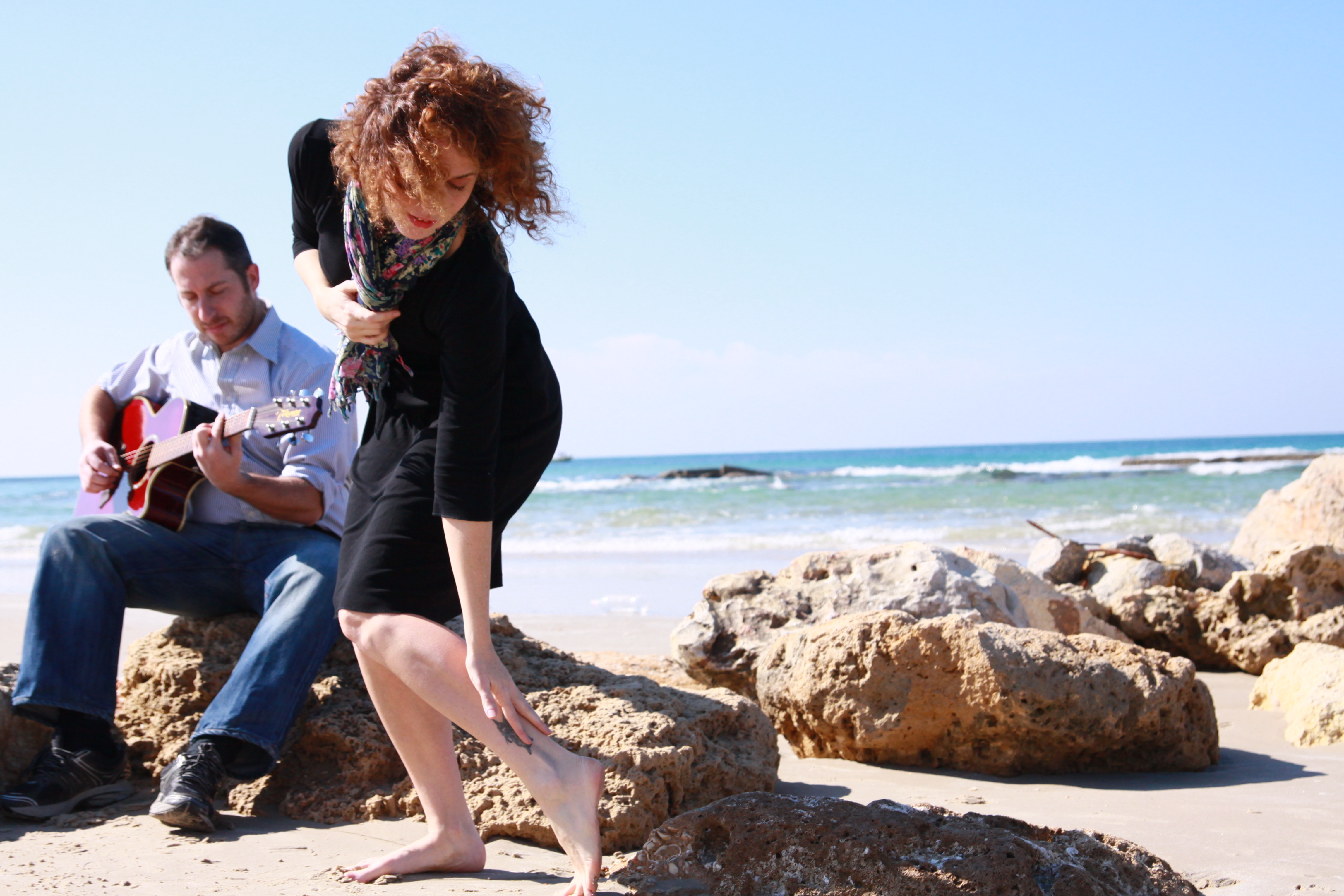 עידית נוידפר במופע לוקחת נשימה